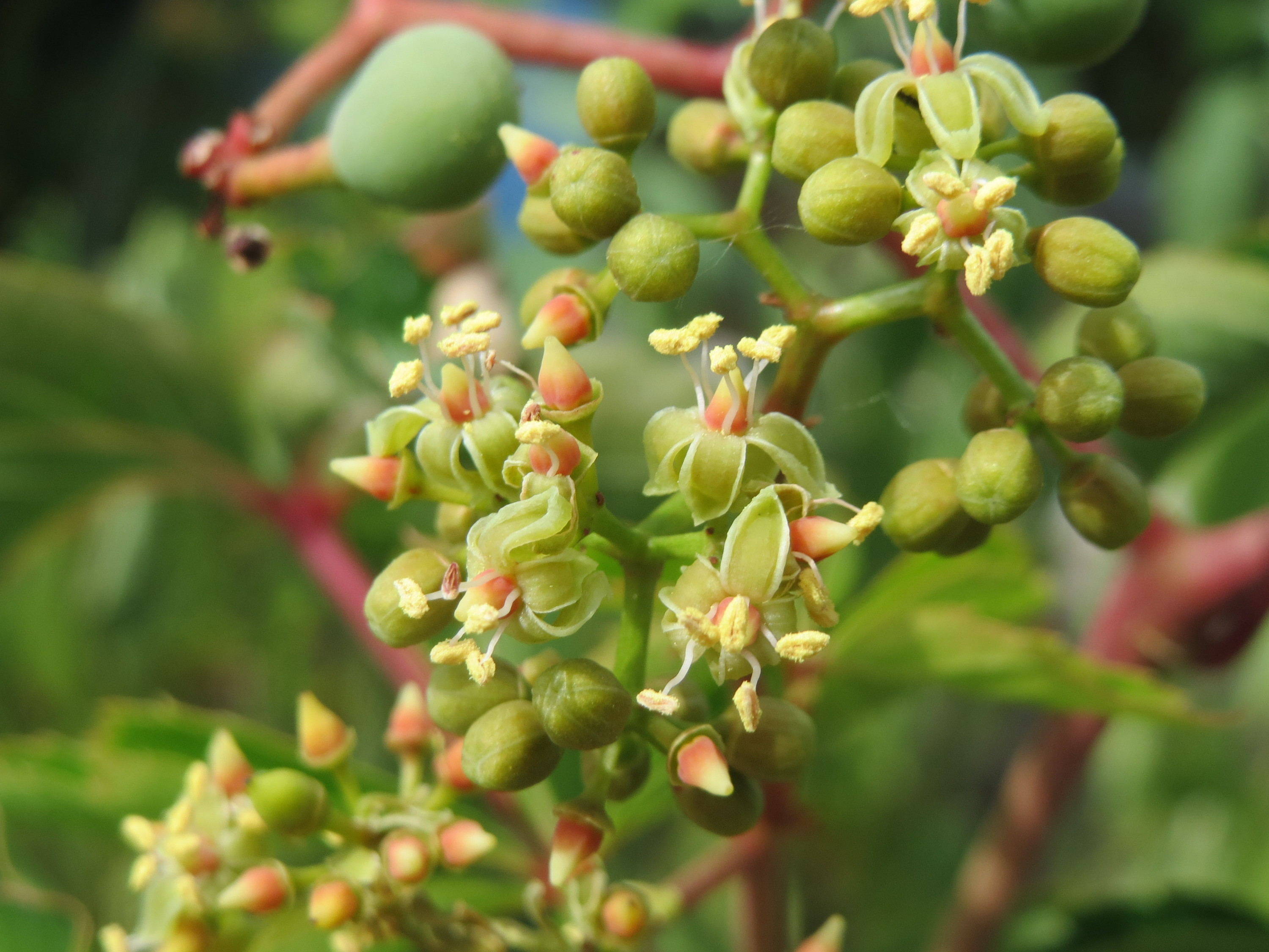 Selbstkletternde Jungfernrebe (Parthenocissus quinquefolia) in einem Schrebergarten bei Oftersheim